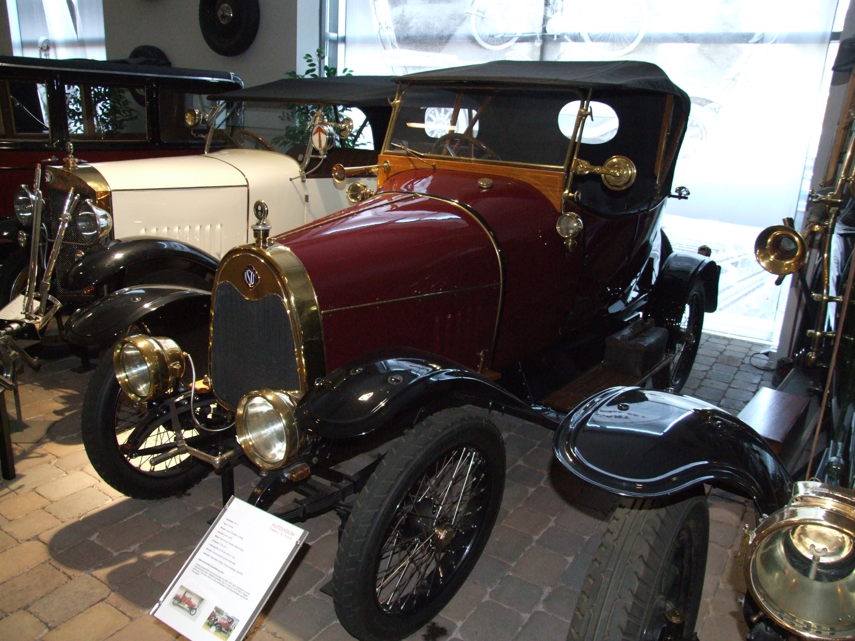 NSU Typ 5, 15 PS, Sport-Roadster 2-Sitzer, Bauzeit 1914-1918, 4 Zylinder, 1232 ccm, Kardanantrieb auf die Hinteräder, Vierganggetriebe